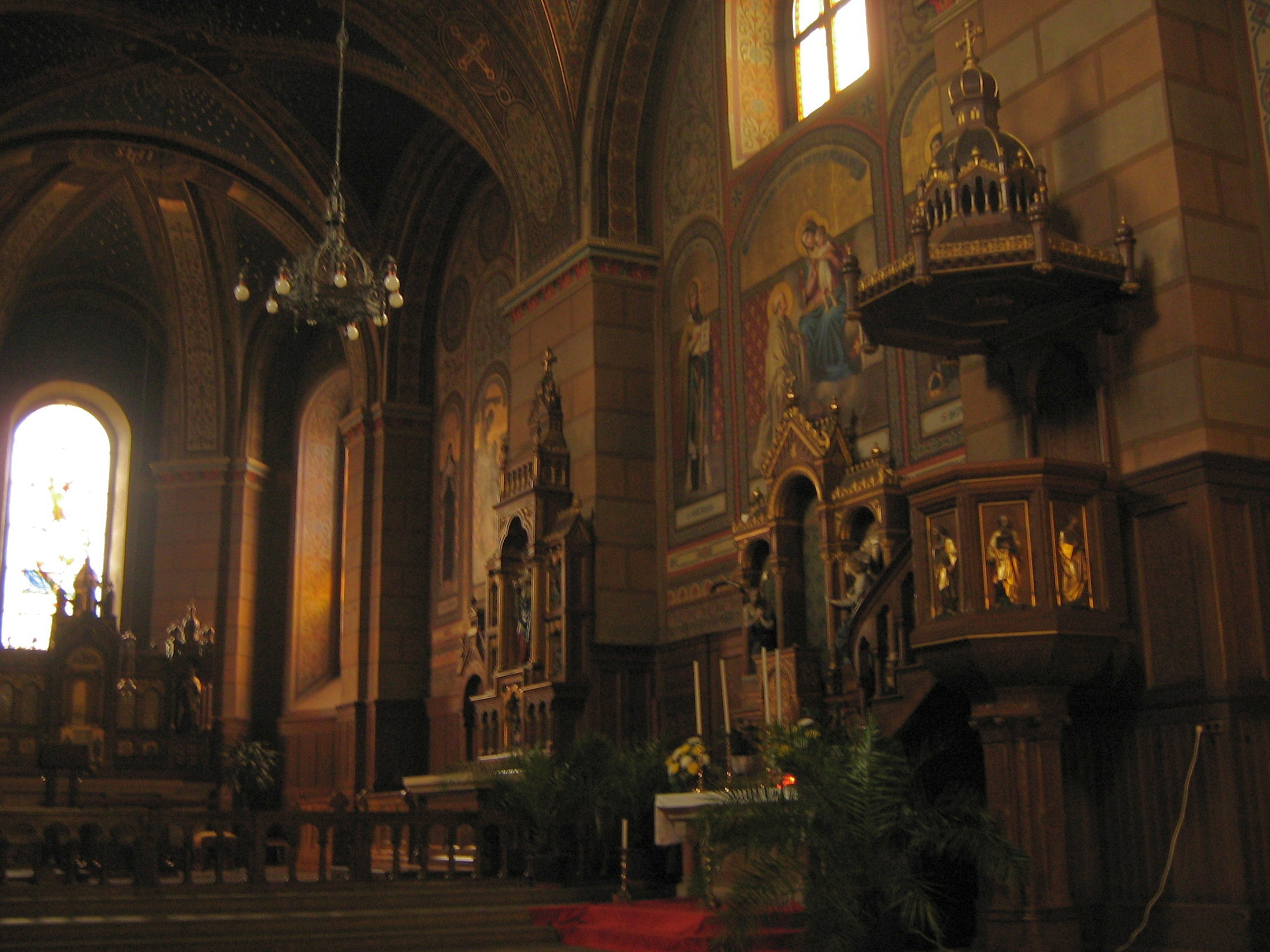 Das Kloster St. Marienthal in der Oberlausitz, Sachsen